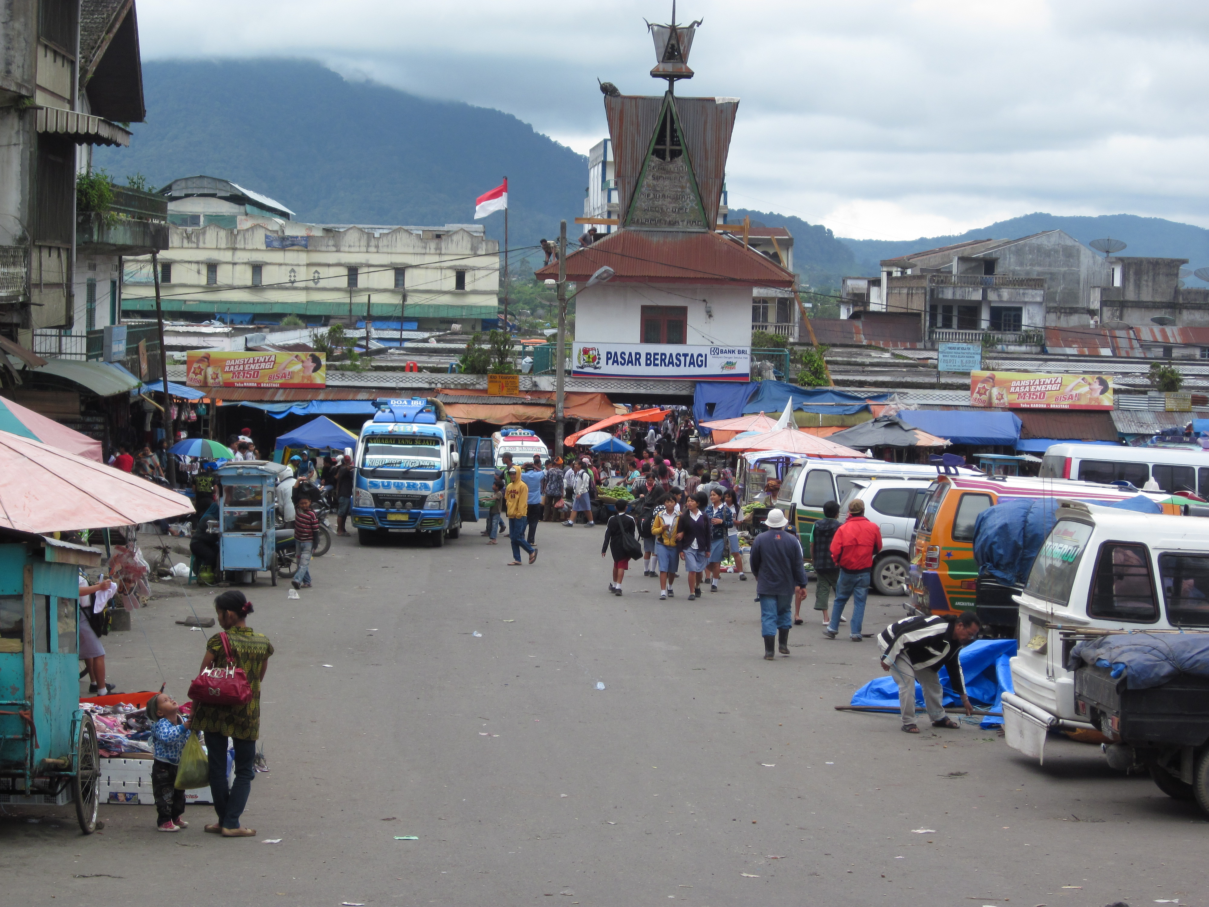 Berastagi Market, North Sumatra, Indonesia